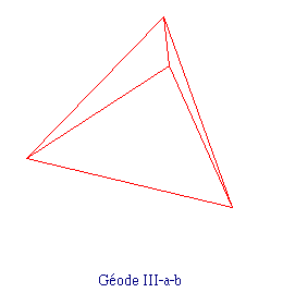 Géodes à base de tétraèdre : étape 1 de la construction